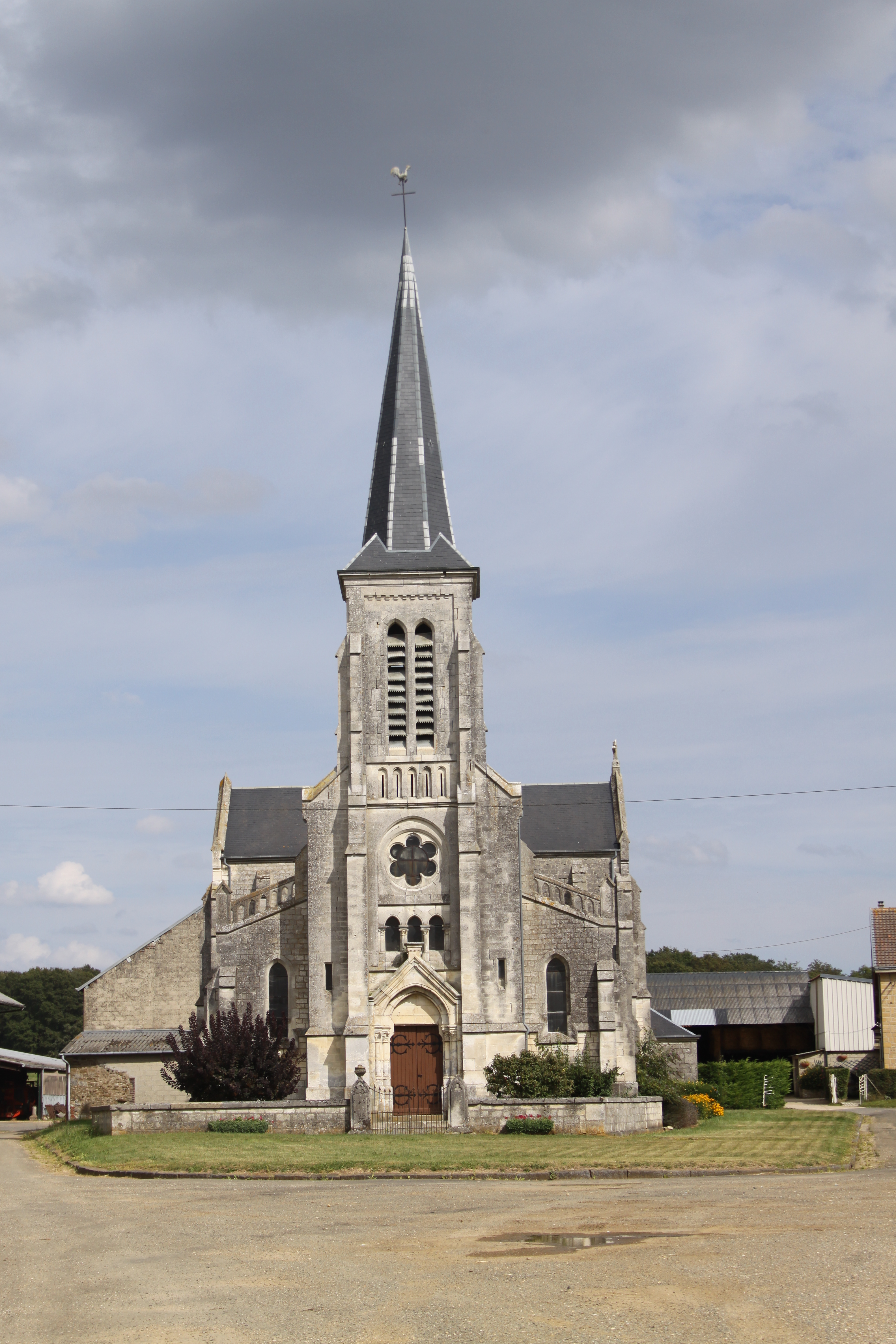 Village Ardennais